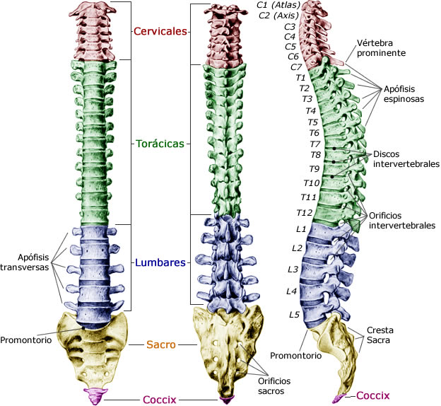 salud